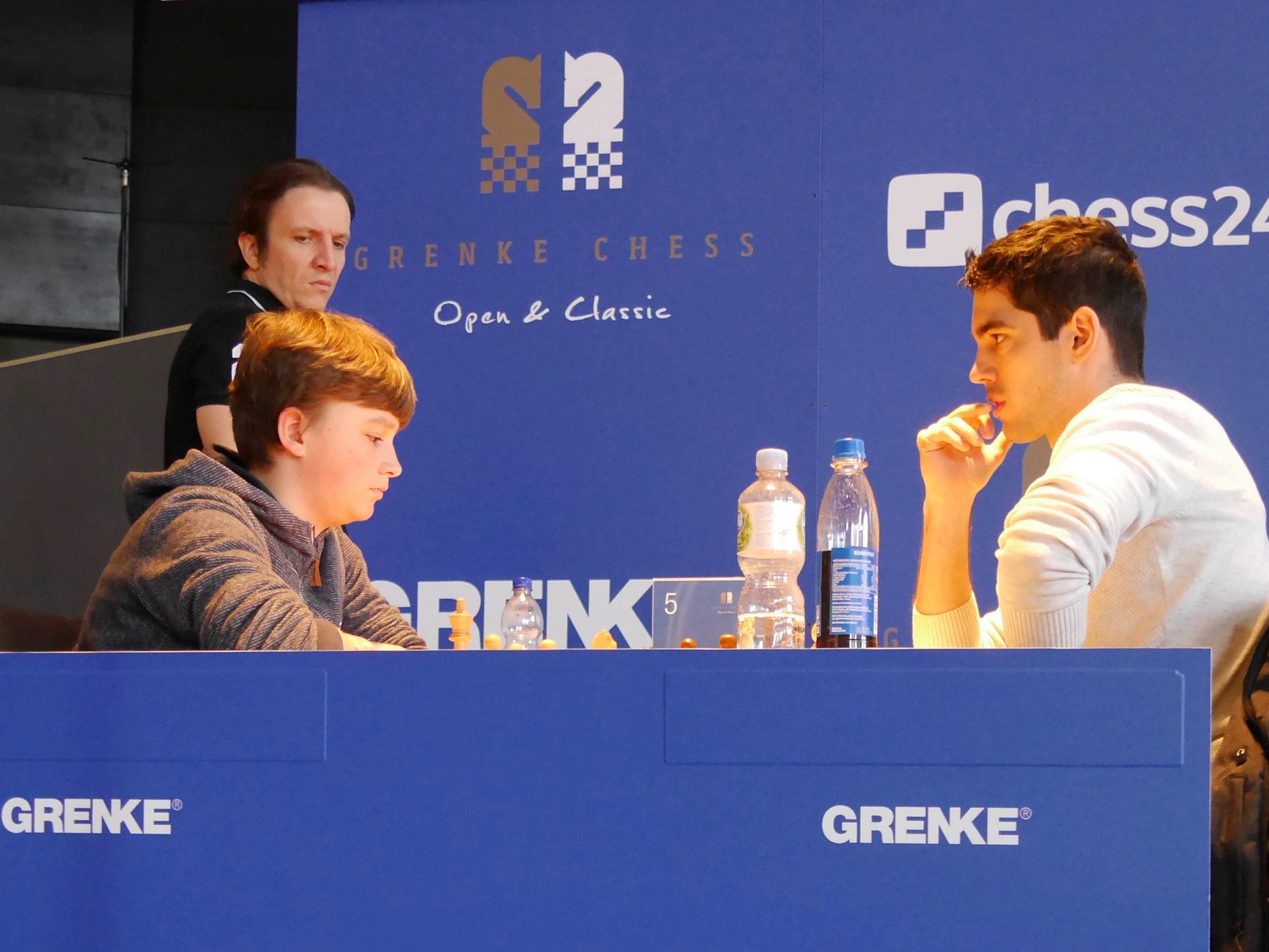 Brett 5: Vincent Keymer - Gabor Papp, Runde 8 Grenke Chess Open 2018 in Karlsruhe.